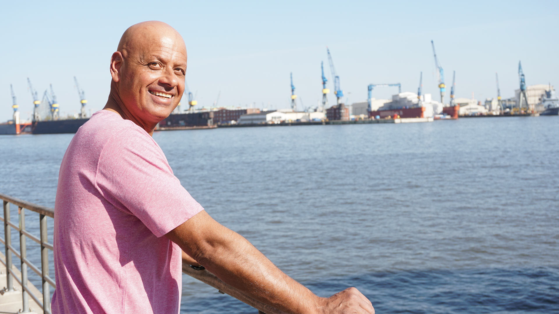 Hamburger Hafen beim St. Pauli Fischmarkt (2020)